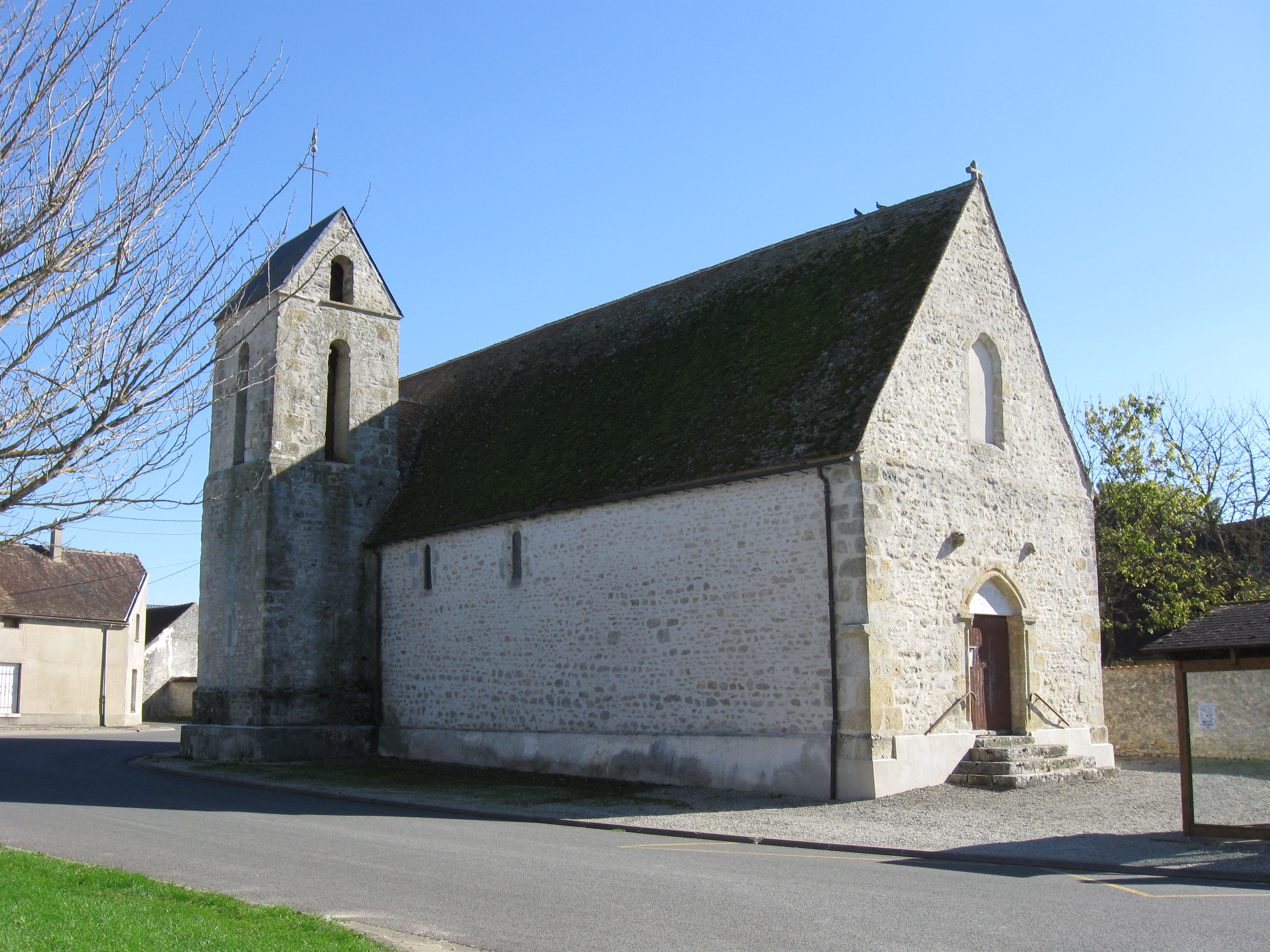 Église Saint-Michel de Maisoncelles-en-Gâtinais. (Seine-et-Marne, région Île-de-France).